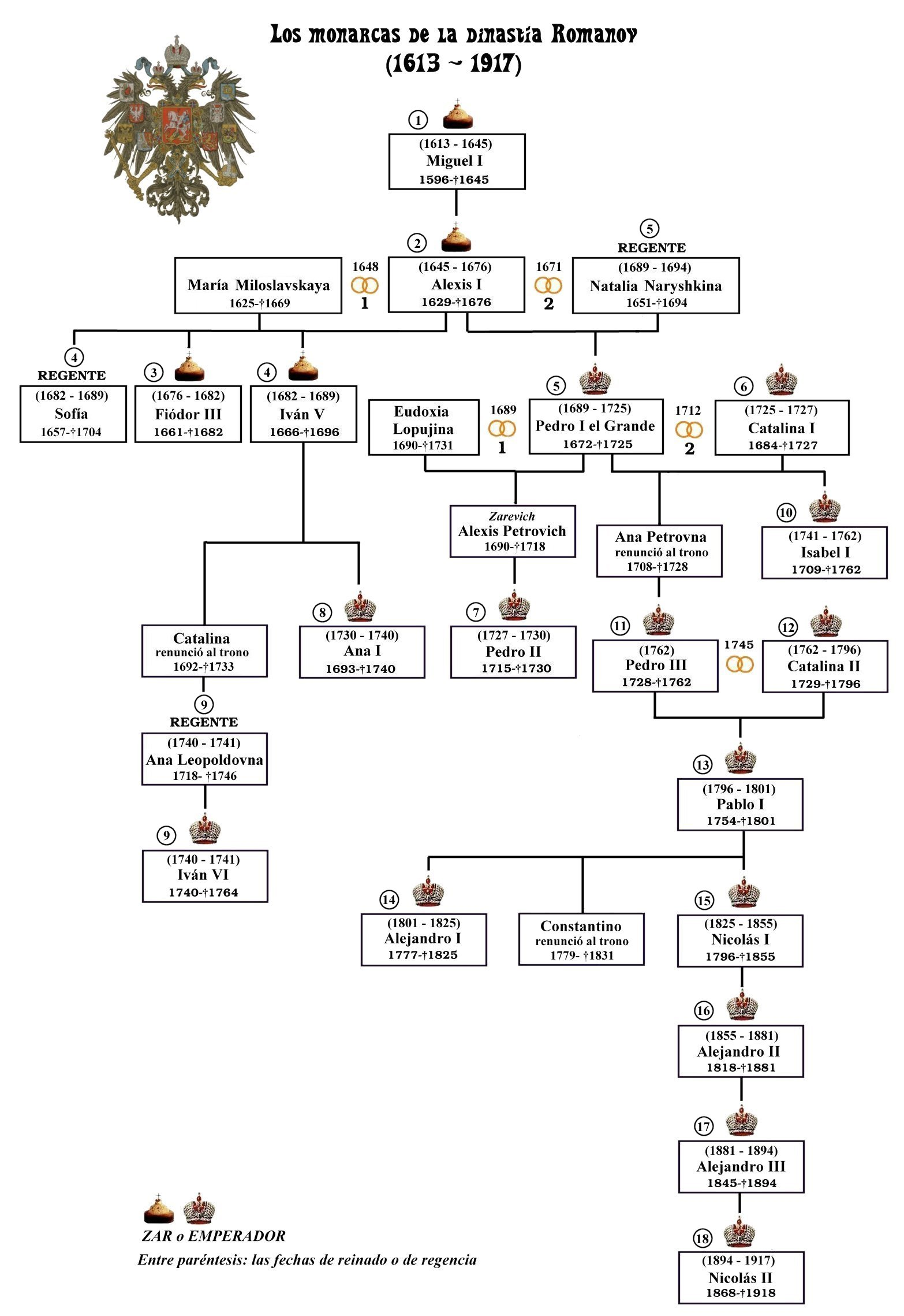 Cuadro cronológico de los monarcas de la dinastía Romanov